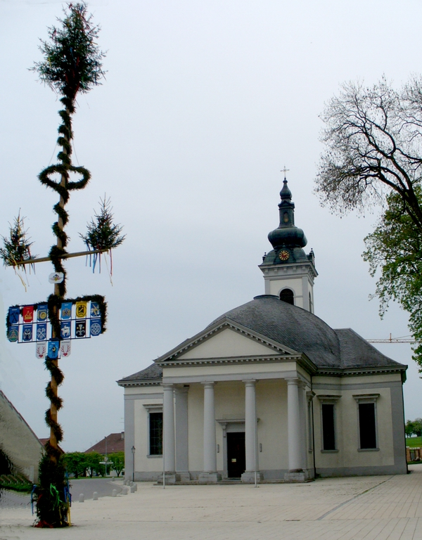 „Schwäbisches Pantheon in“ Oberdischingen